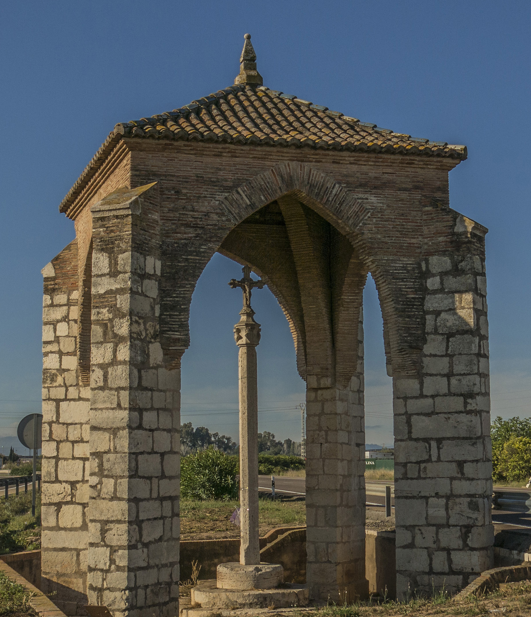 Creu Coberta. Medieval, d'estil goticomudèjar. Restaurada en 1962. És el lloc on tradicionalment s'ubica la mort de Jaume I (Viquipèdia)